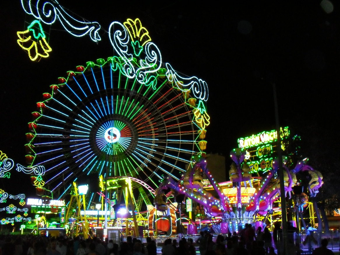 J.J Reyes